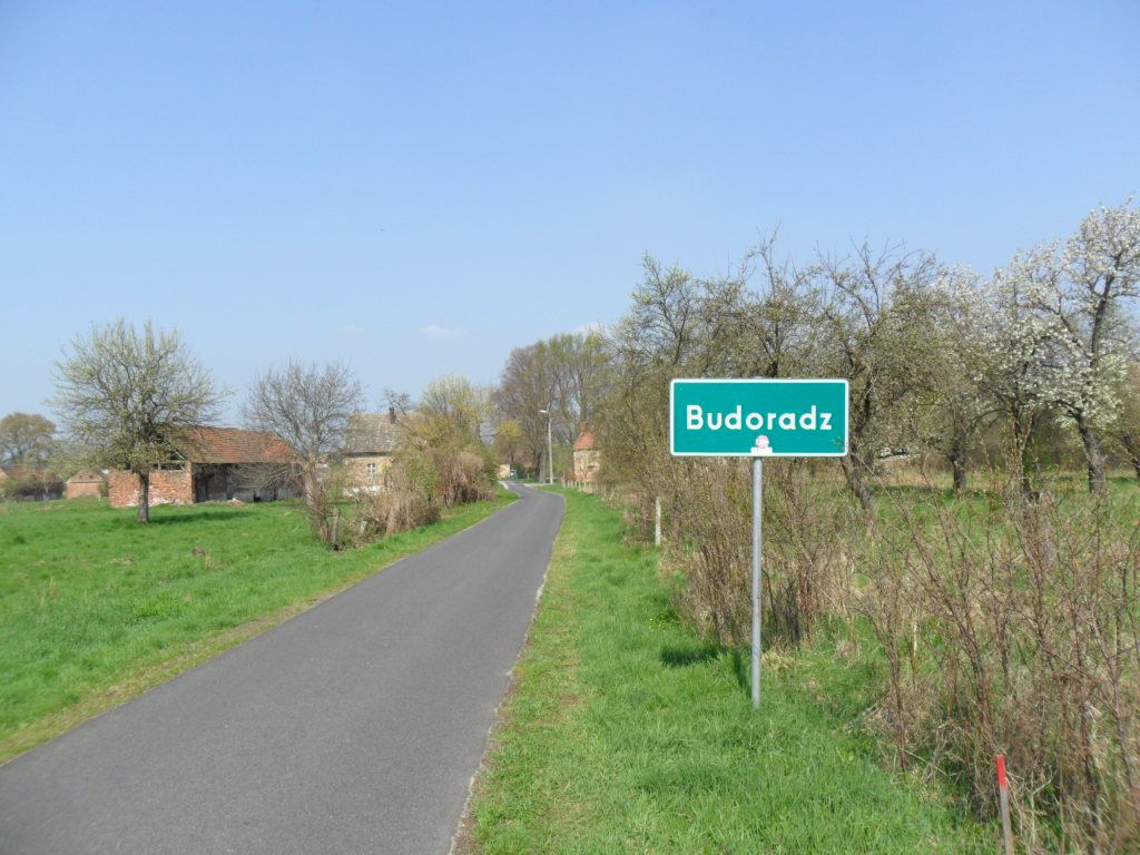 Budoradz koło Gubina